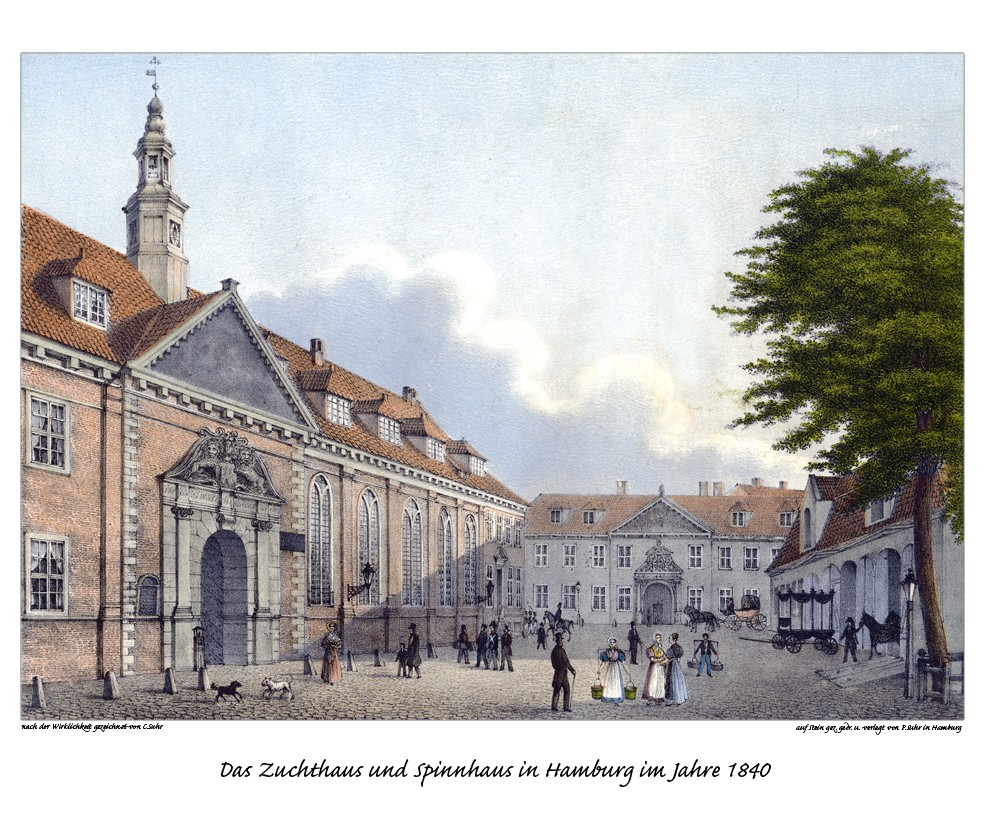 Das Zuchthaus und das Spinnhaus in Hamburg im Jahre 1840, gezeichnet von Christoffer Suhr, Litho von Peter Suhr